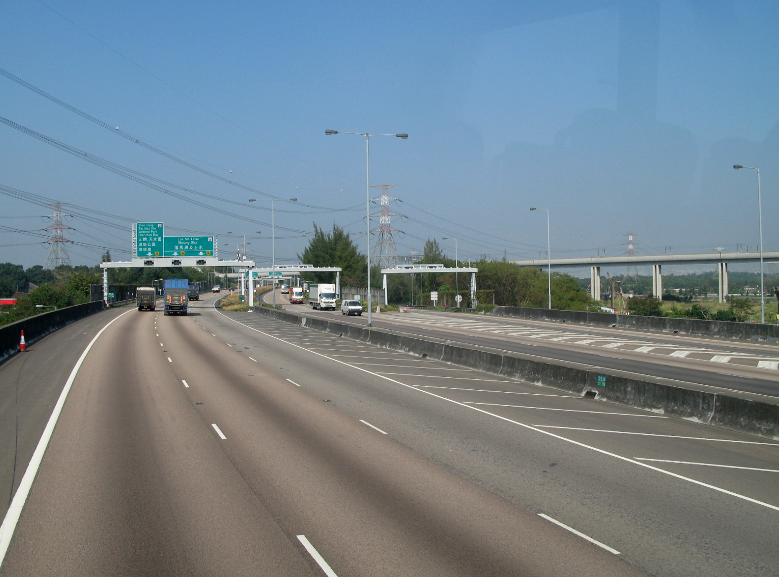 青朗公路 Tsing Long Highway